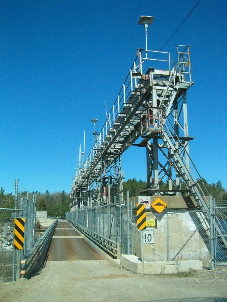 Barrage Paugan (Low, Québec)